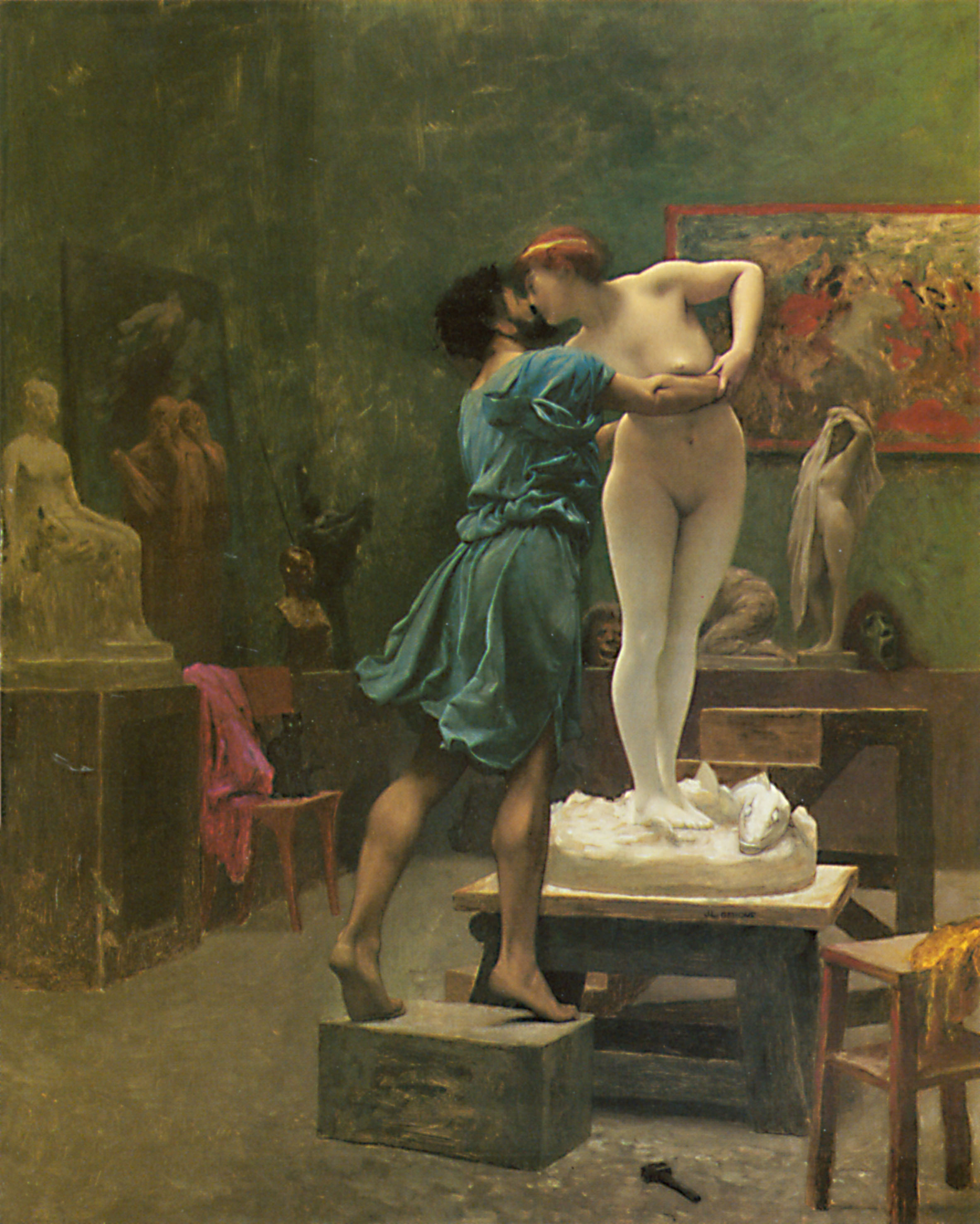 Pygmalion et Galatée, oil on canvas, 94x74 cm